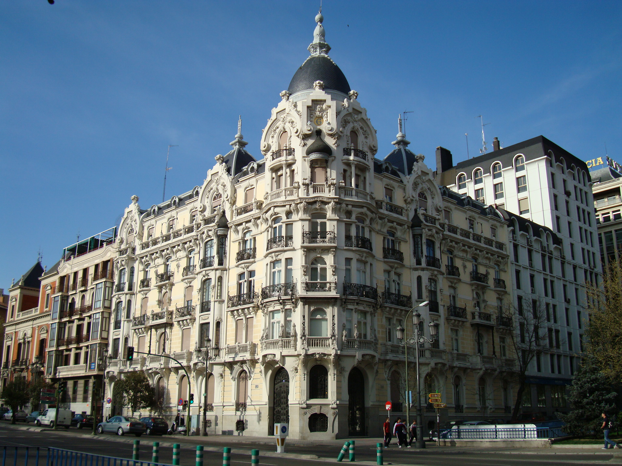 Casa Gallardo